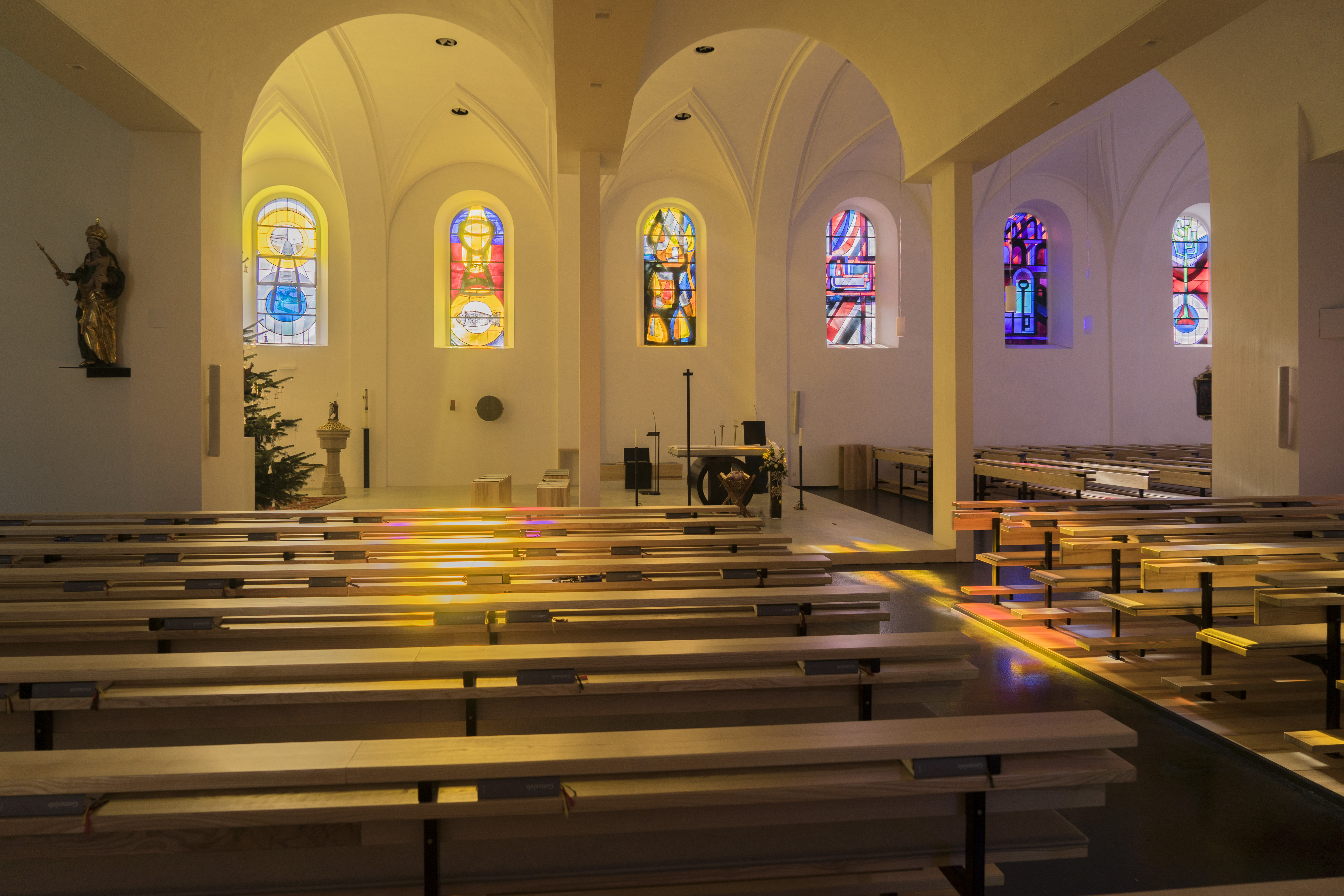 Pfarrkirche Ampflwang, Innenraum mit Fenstern von Maria Moser Maria Moser (Künstlerin) und Rudolf Kolbitsch